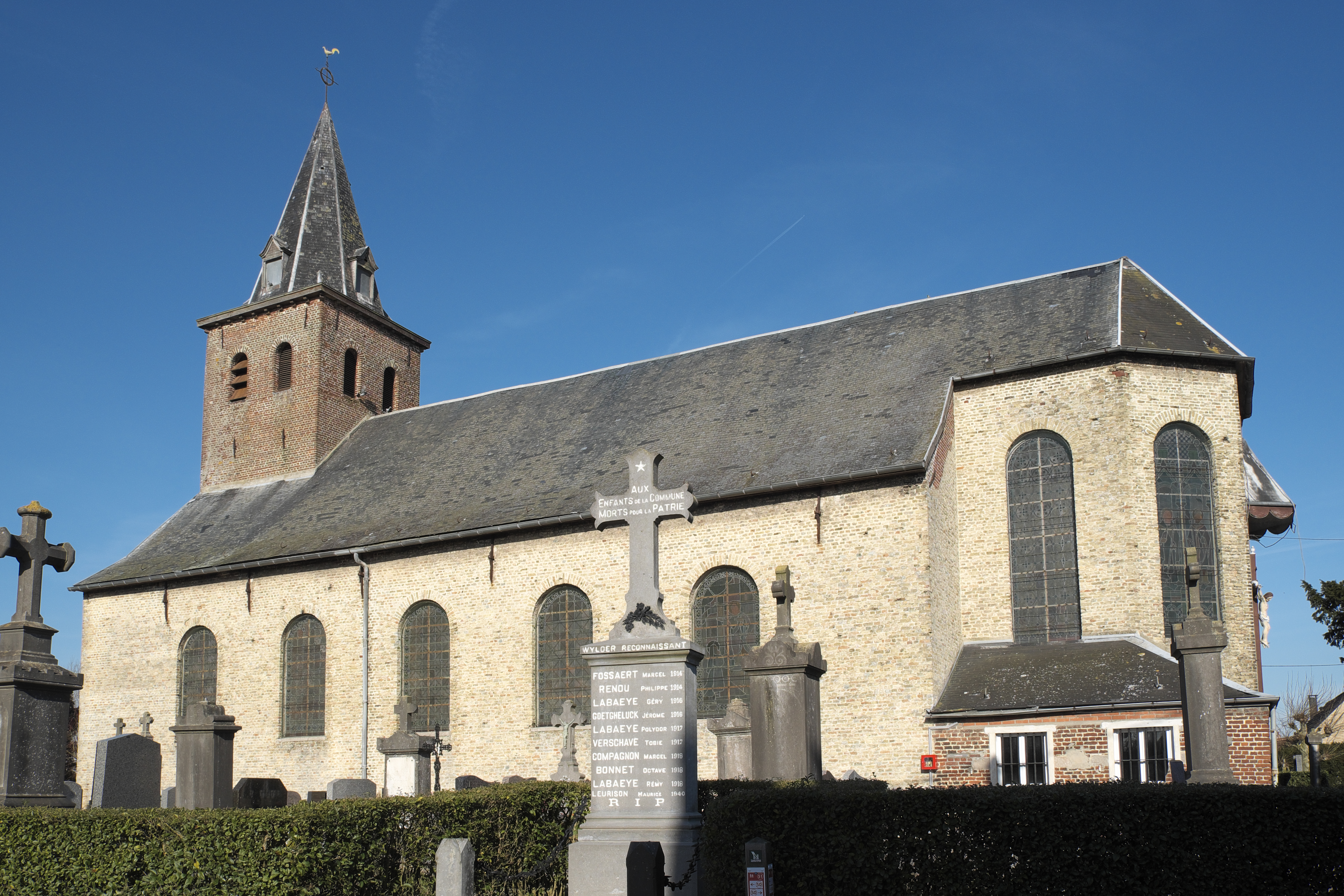 Kirche Saint-Martin in Wylder im Département Nord (Nord-Pas-de-Calais/Frankreich)